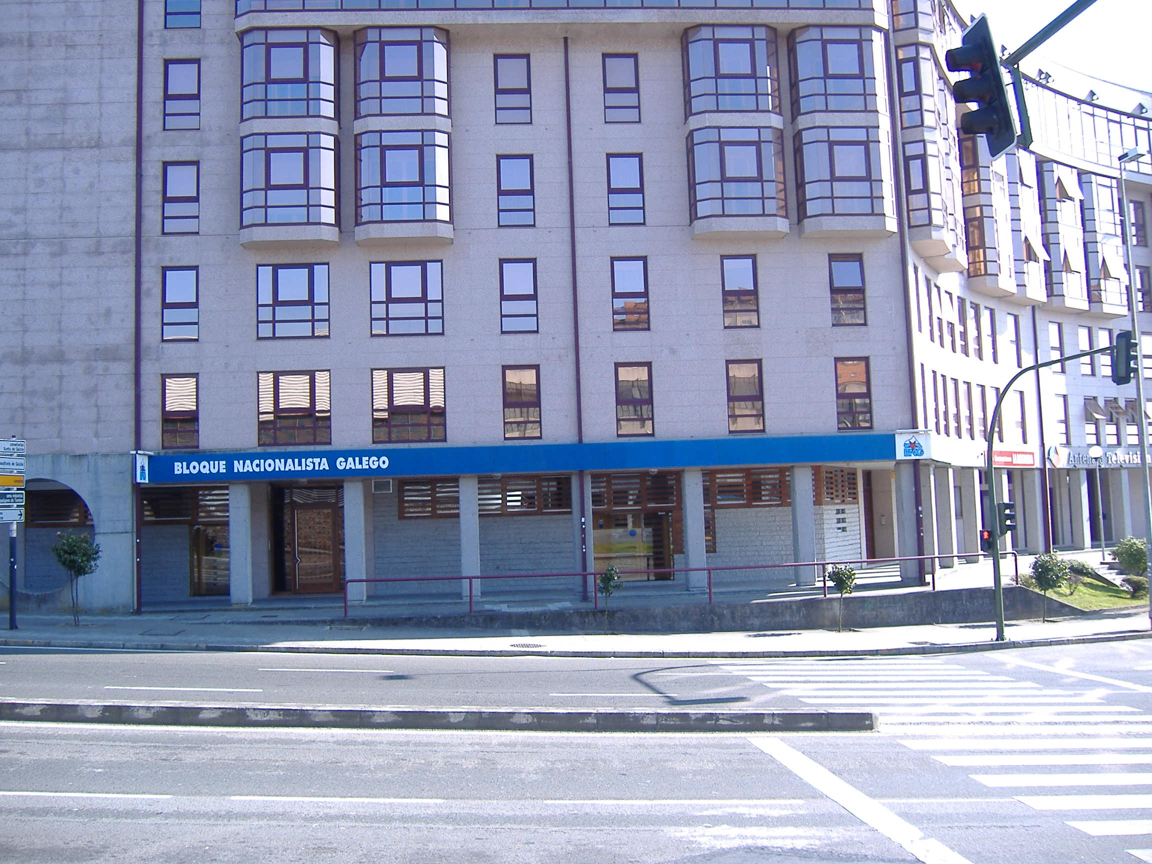 Sede Nacional do Bloque Nacionalista Galego, Santiago de Compostela 20px